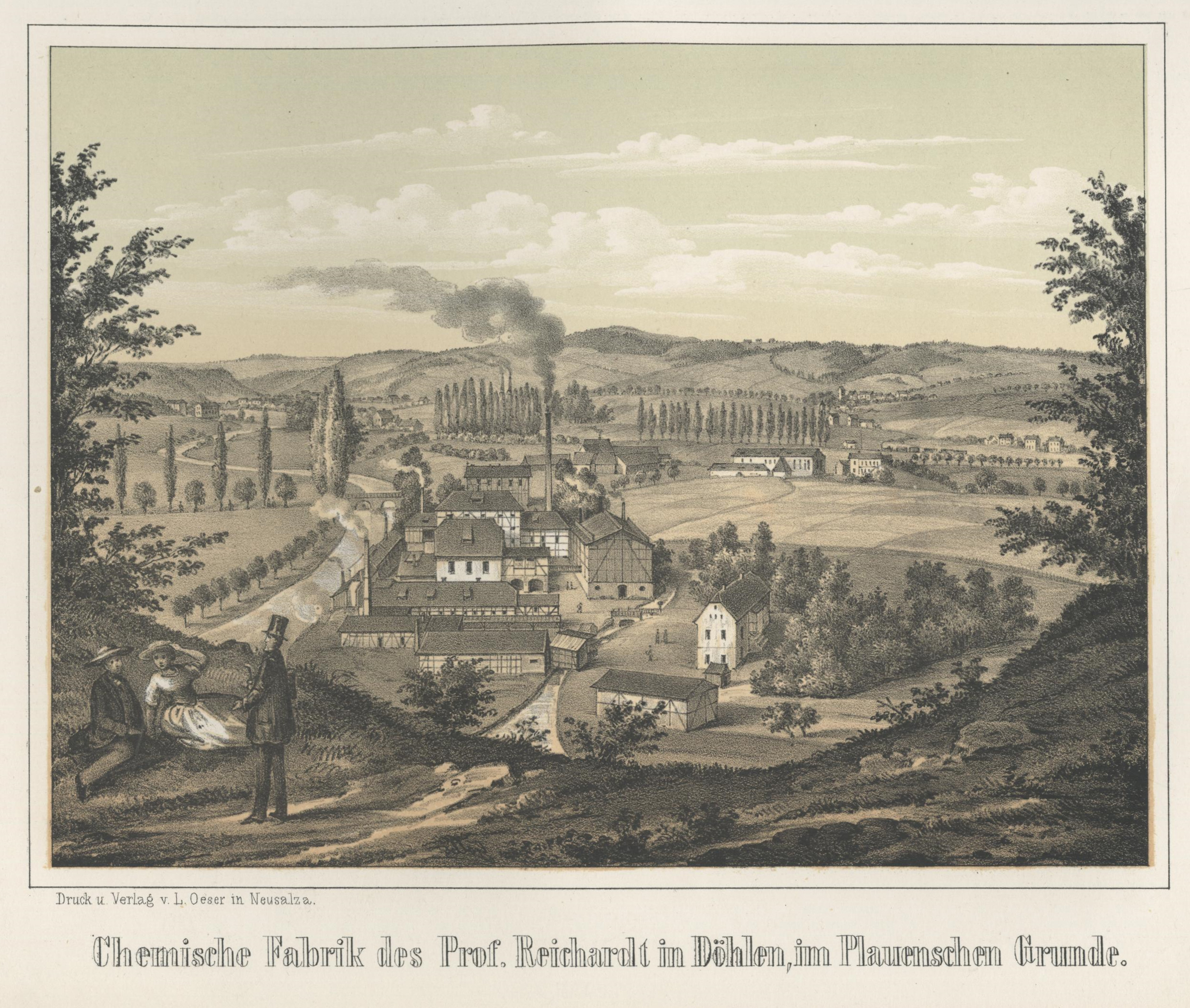 Chemische Fabrik des Prof. Reichardt in Döhlen, im Plauenschen Grunde aus: Album der Sächsischen Industrie Erster Band